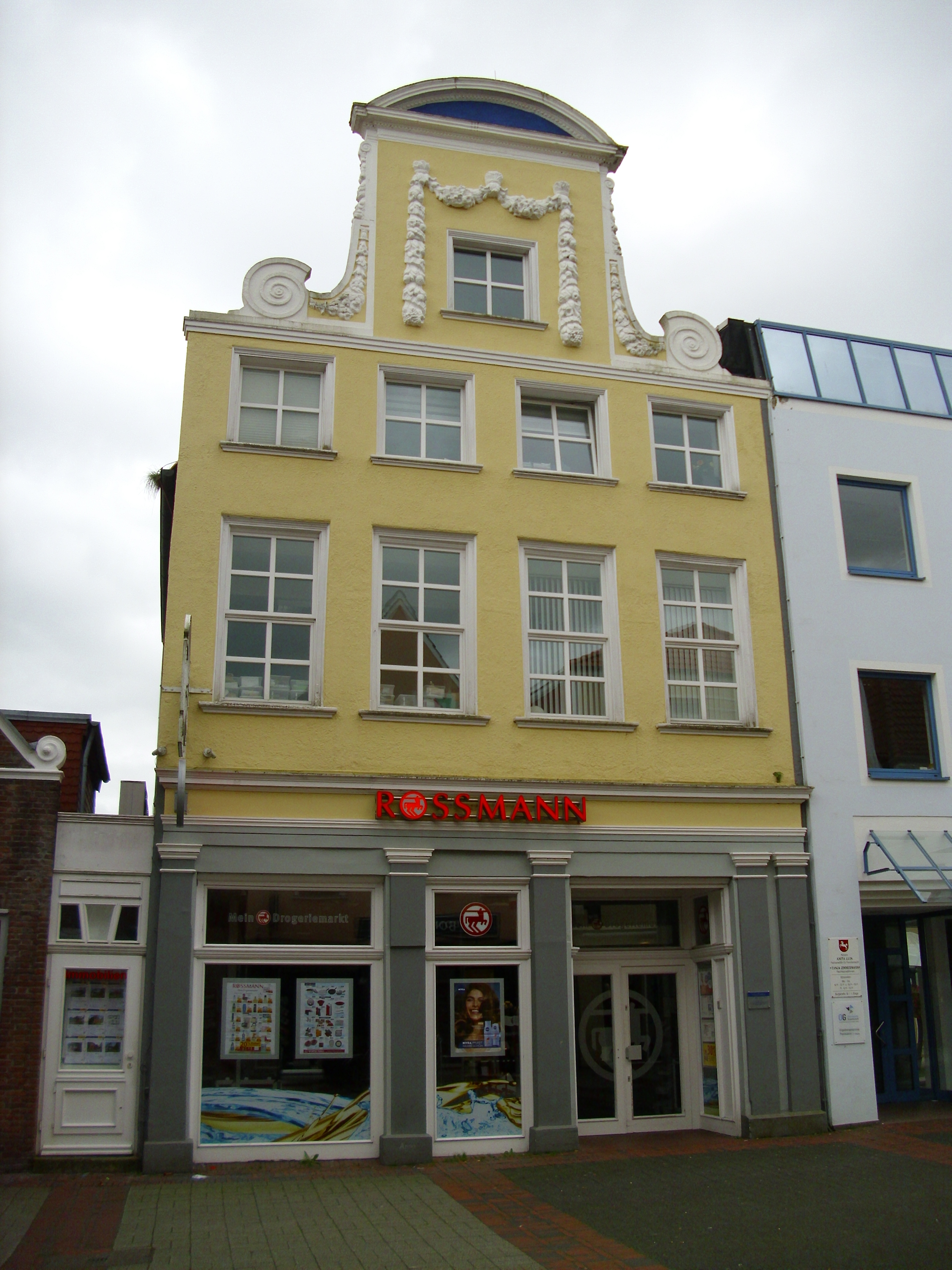 Evertssches Haus, Aurich, Ostfriesland, Burgstraße 17 (September 2015)